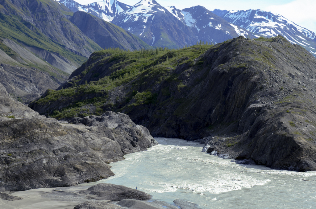 Turnback Canyon Eingang